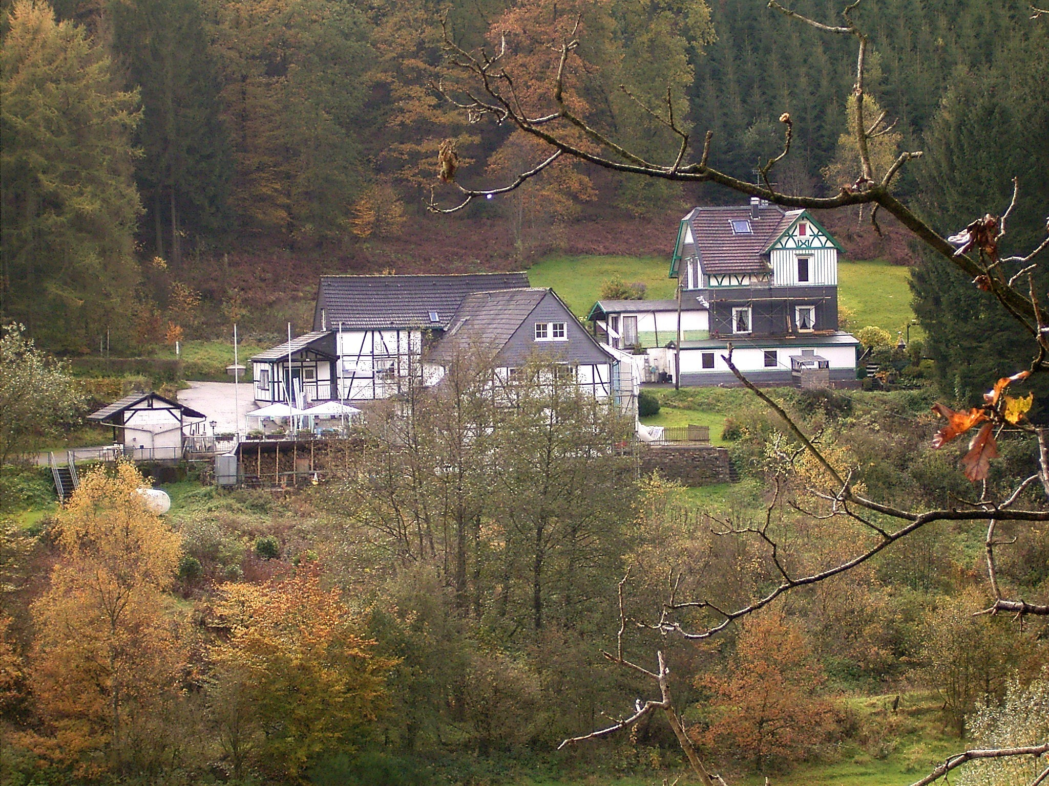 Radevormwald